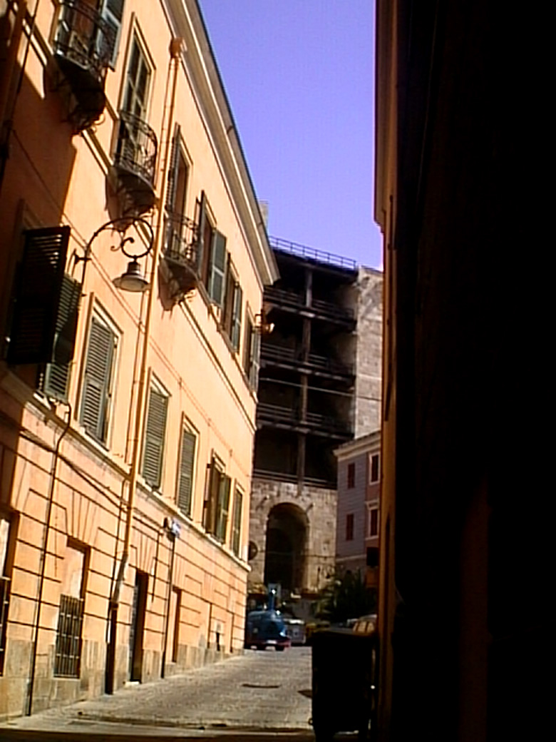 Torre di San Pancrazio, Cagliari